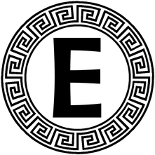 Parteilogo - Ethniki Avgi (EA), „Ersatzpartei“ der Crysi Avgi